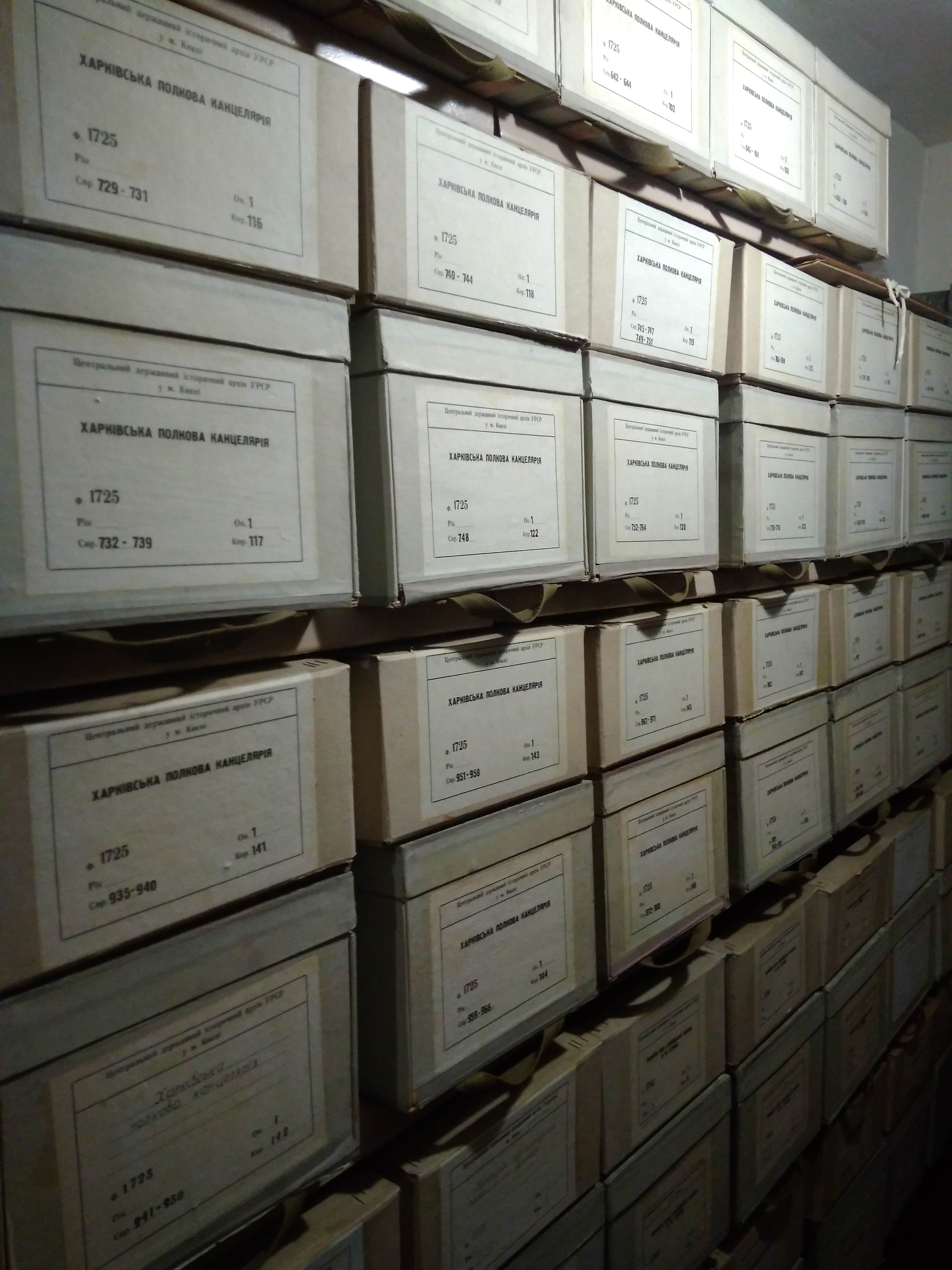 Хранилище ЦДІАК